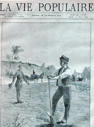 Illustration anonyme d'un conte d'Octave Mirbeau (1848-1917), paru dans "La Vie Populaire" le 12 mars 1891.